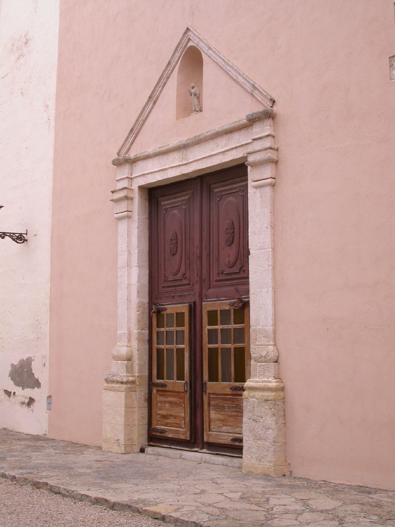 Porta de Santa Magdalena de Bonastre